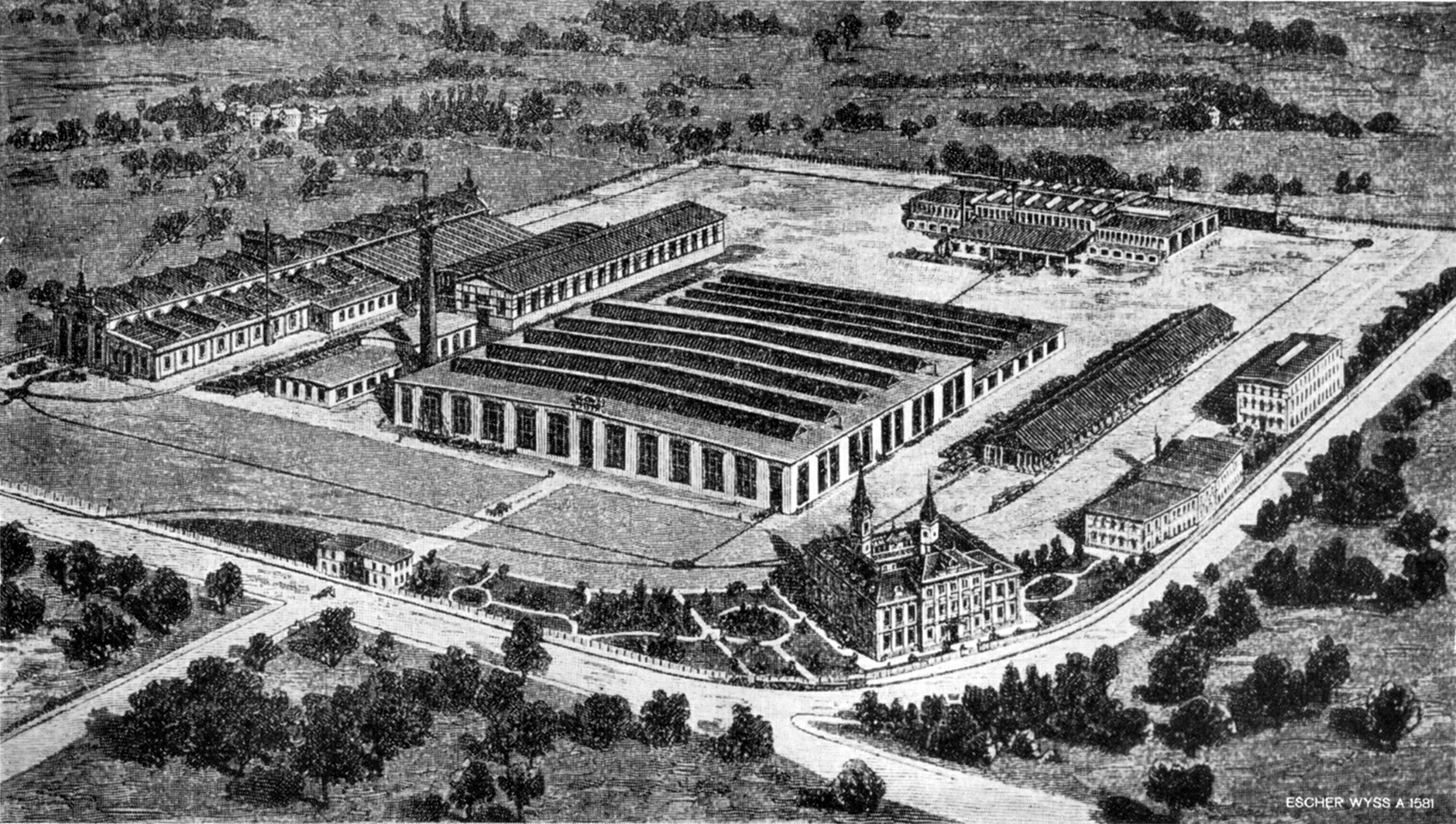 Die Fabrik von Escher Wyss im Hard in Zürich 1903. Im Vordergrund der heutige Escher Wyss-Platz.